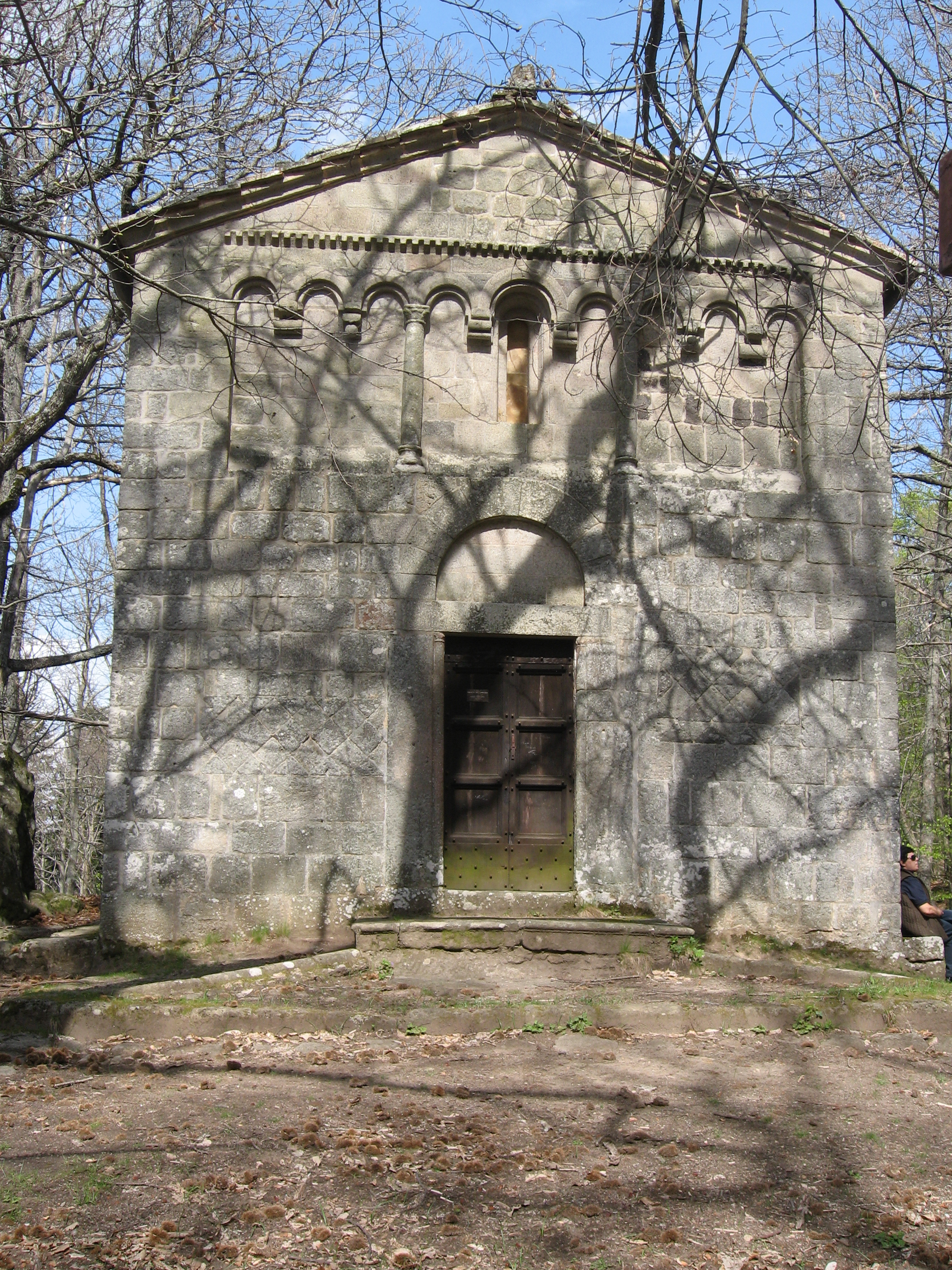 Vivo d'orcia Eremo del Vivo. Vivo d'Orcia - Siena - Tuscany - Italy